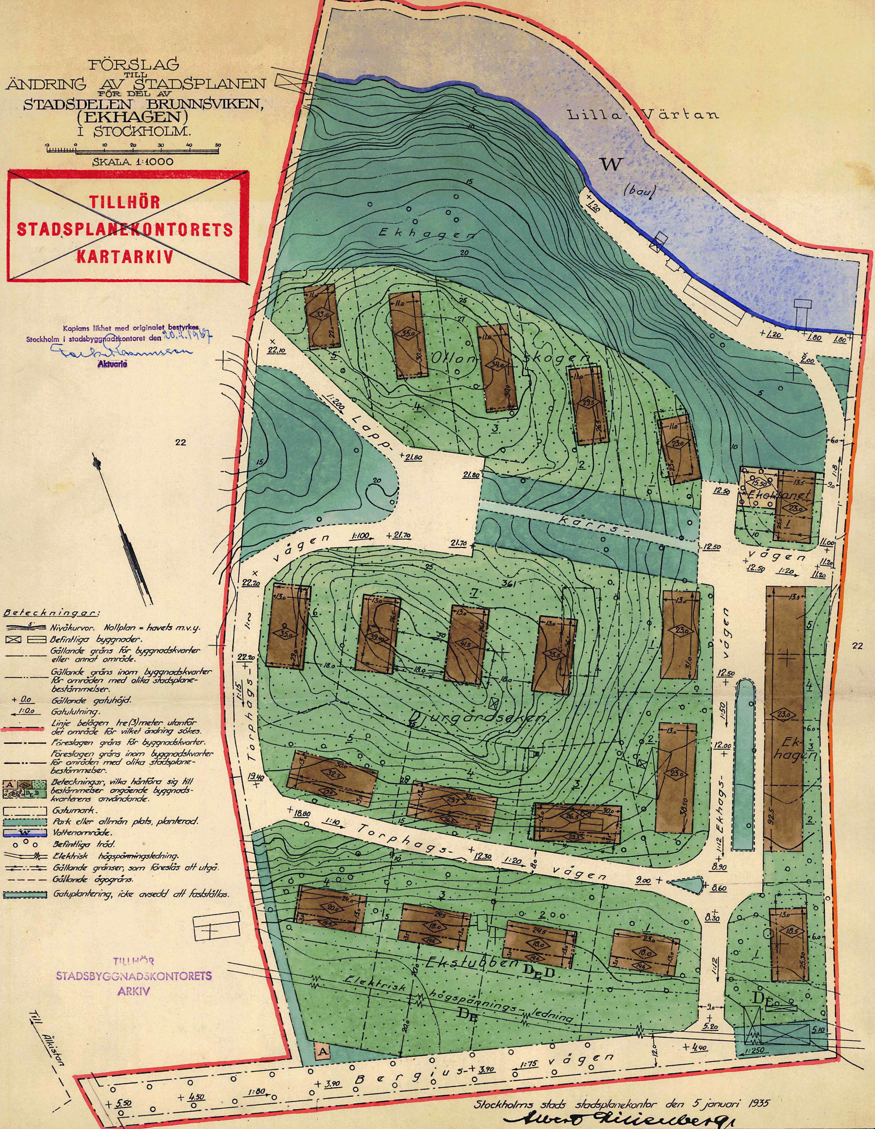 Stadsplan Pl 1576 för området "Ekhagen" på Norra Djurgården